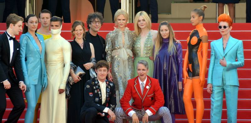 L'équipe du film "How to Talk to Girls at Parties " au festival de Cannes